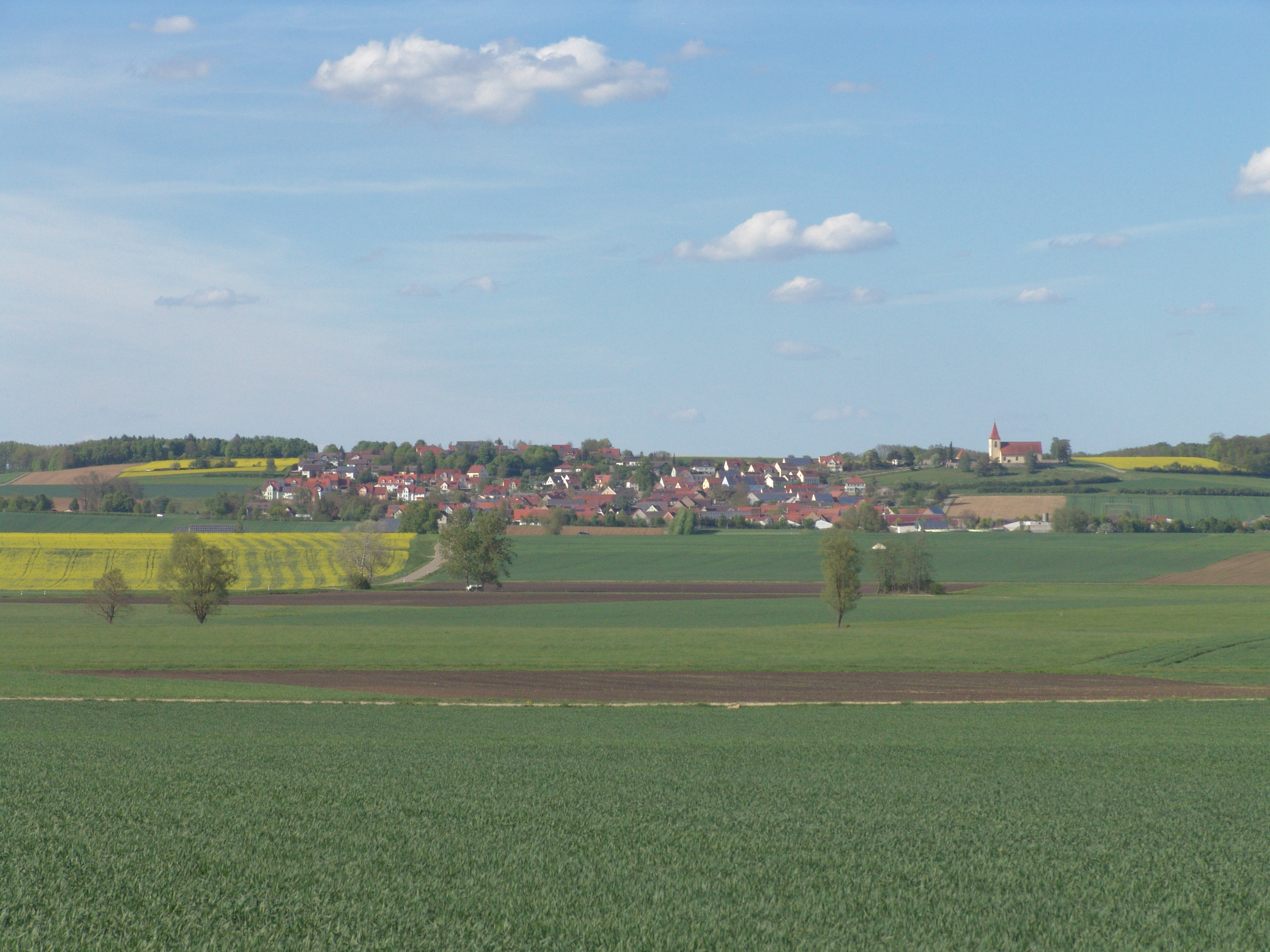 Ehingen am Ries von Süden aus gesehen